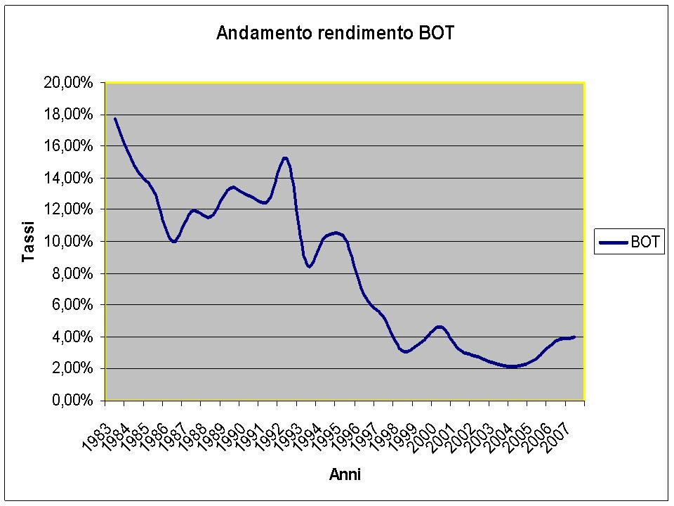 Rendimento dei buoni ordinari del tesoro (bot) negli anni